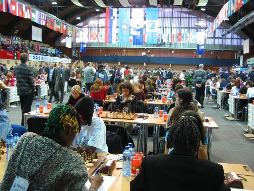 Olimpiada 2002 Bled. Pogled na igralno dvorano.